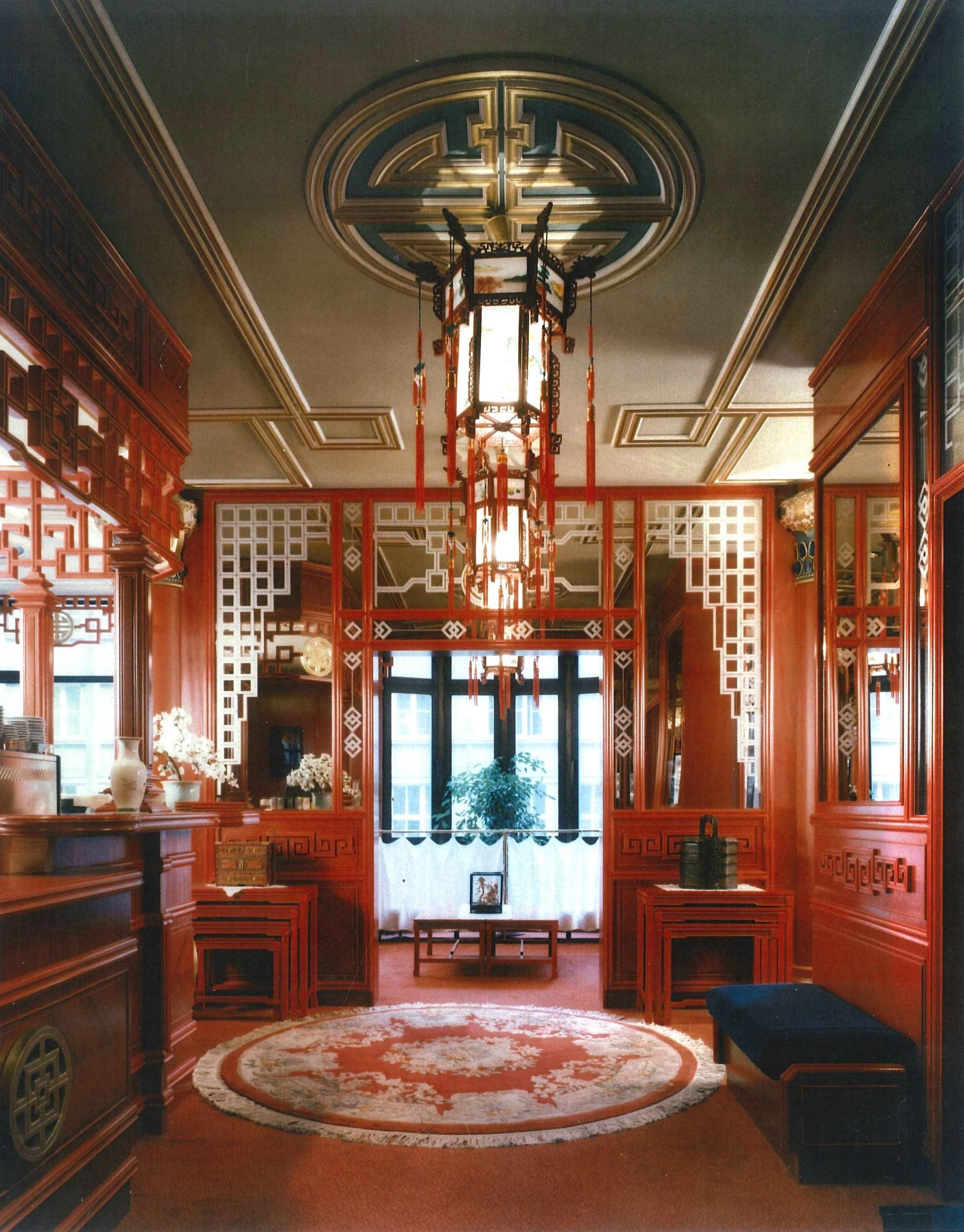 Eingangsbereich des von Gerd Pieper entworfenen Pekingrestaurants im rekonstruierten Gebäude des ehemaligen Kaufhaus Moritz Mädler